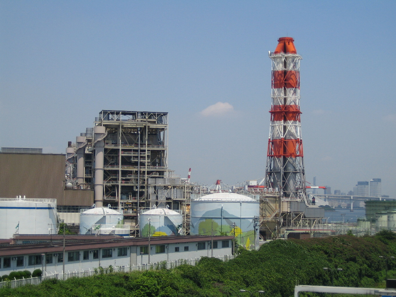 大井火力発電所 (品川区八潮)